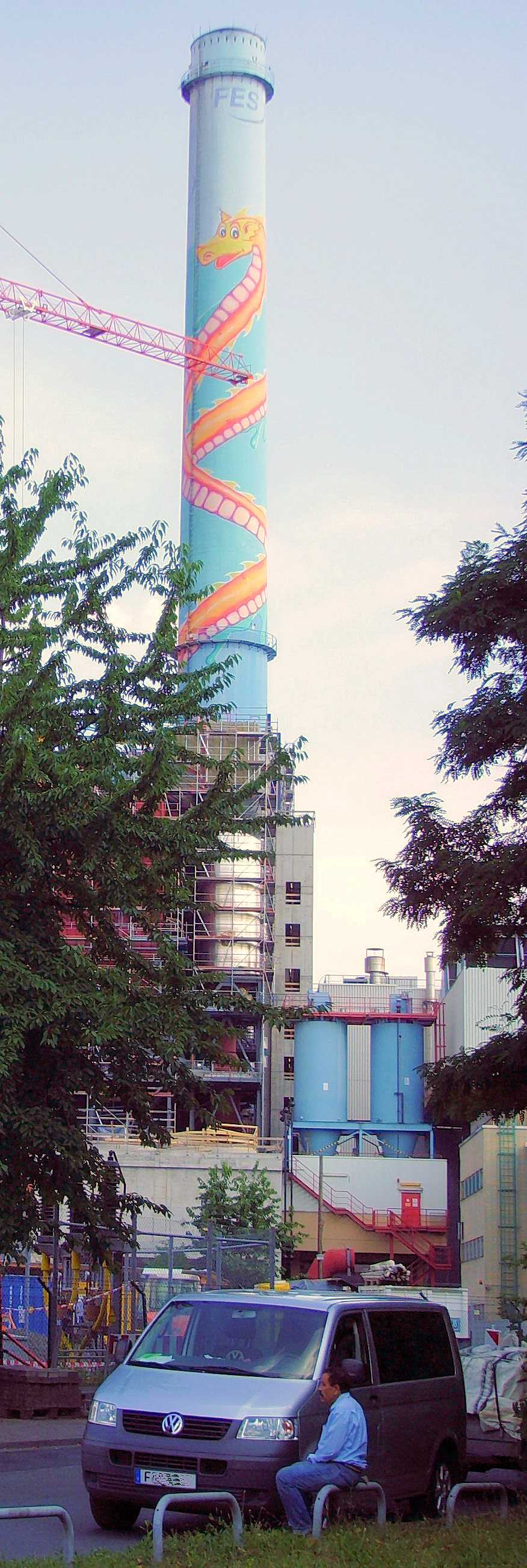 Frankfurt am Main-Heddernheim, Schornstein mit Graffito, Müllverbrennungsanlage / Heizkraftwerk Nordwest